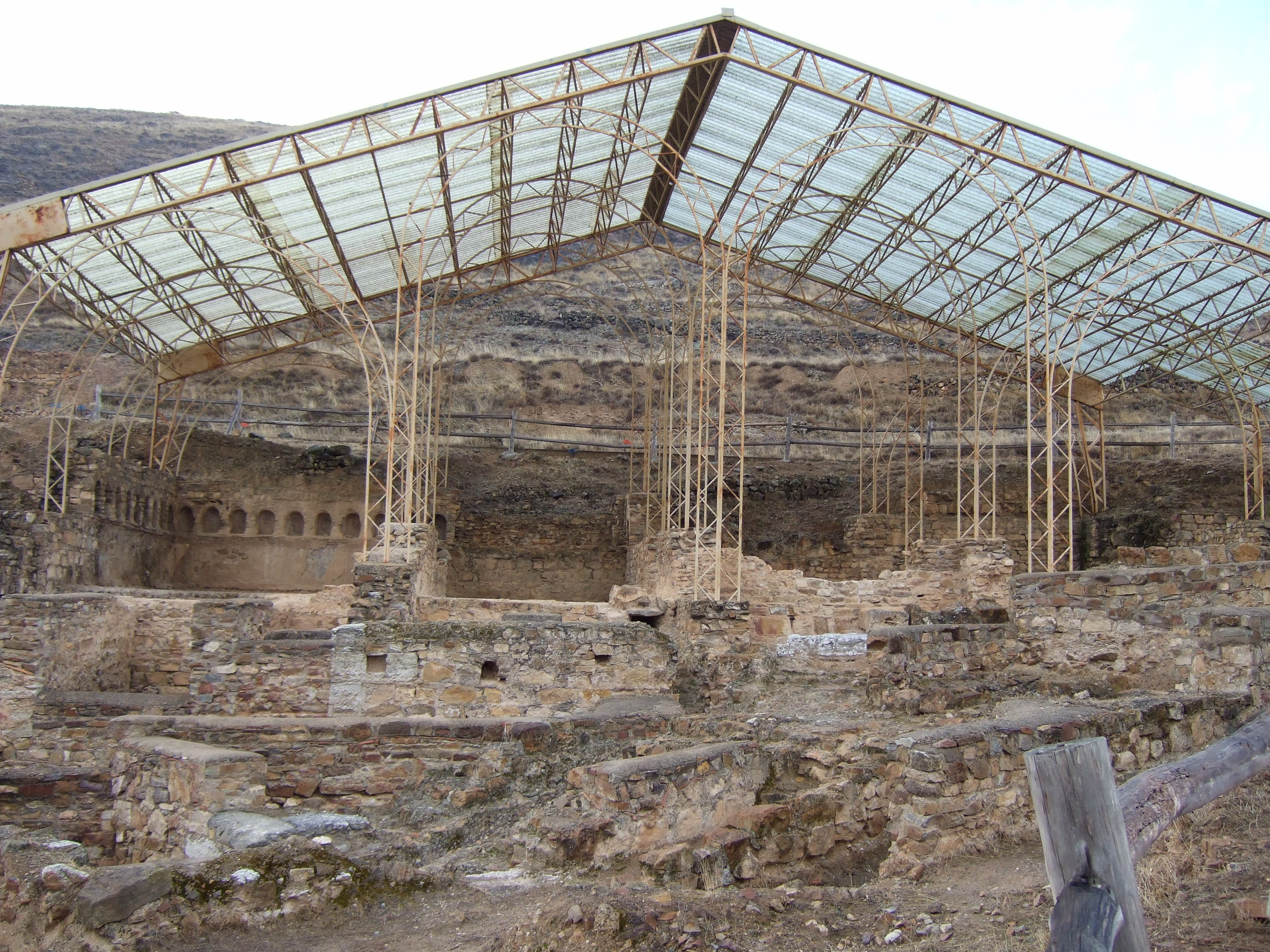 Termas de Bílbilis, abandonadas a finales del siglo II ddC